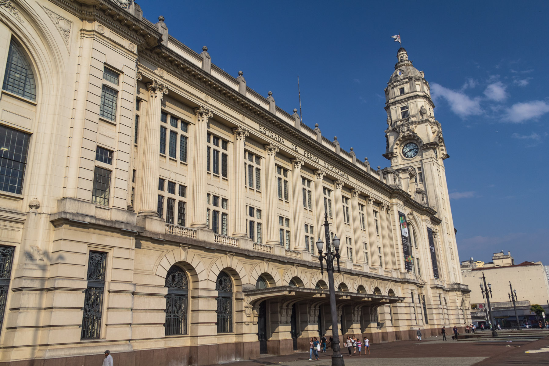 Estaçao Julio Prestes,Sao Paulo,2013